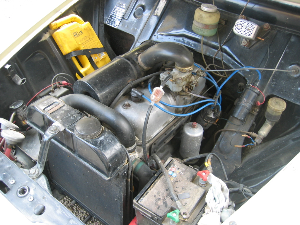 Moteur d'une Peugeot 403